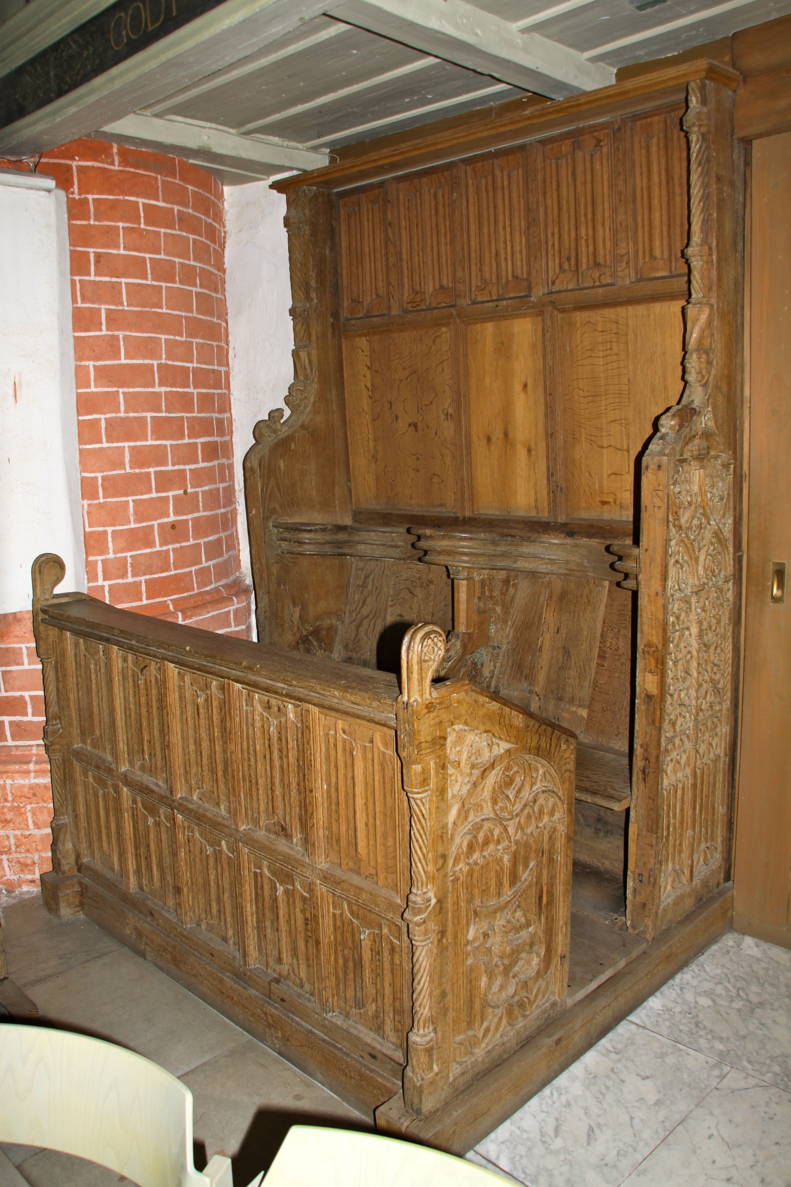 Grafenstuhl mit Einhornwappen in der Ludgerikirche Norden (Ostfriesland) Chor der Ludgerikirche